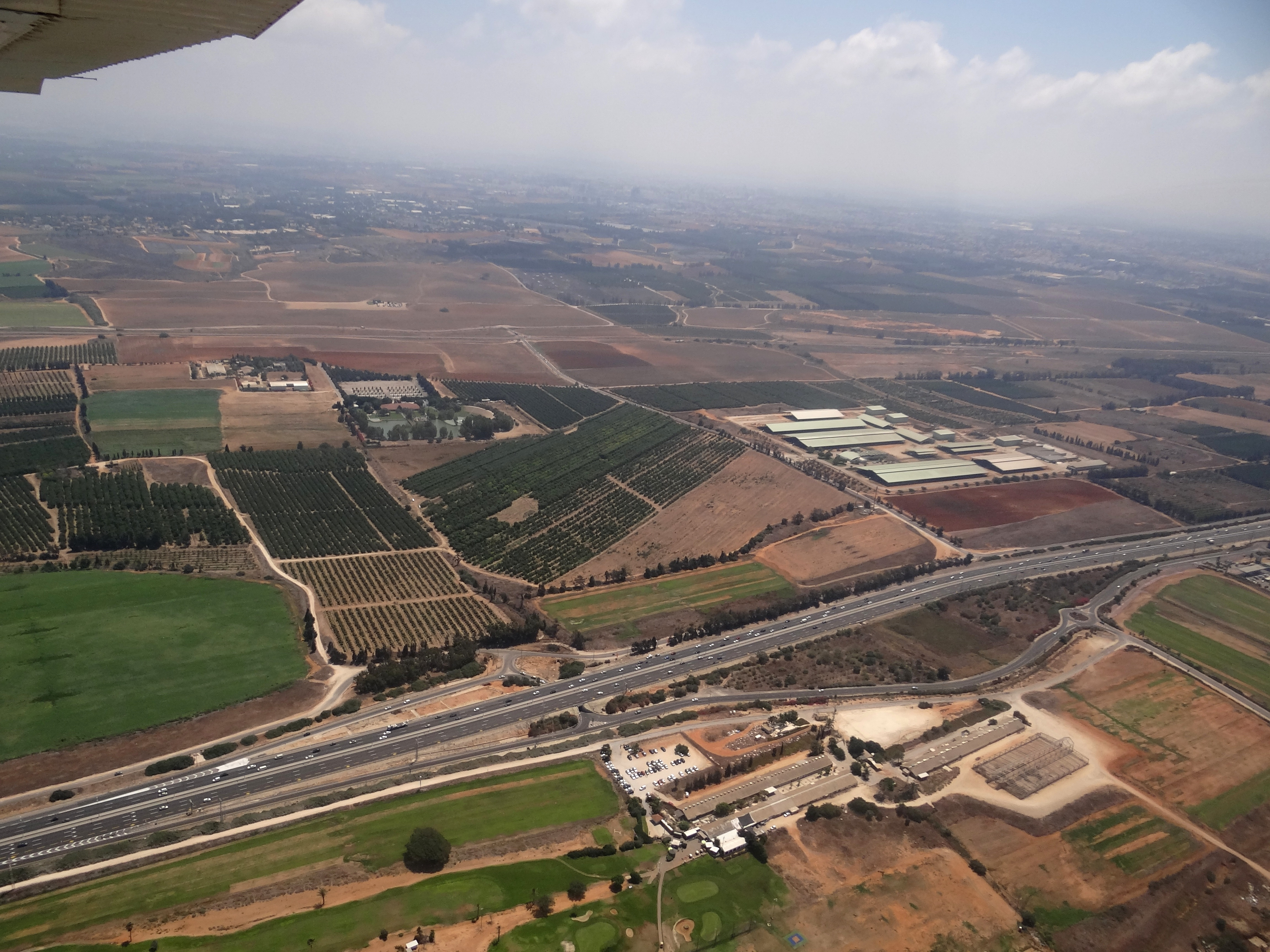 כביש 2 בישראל ליד קיבות געש